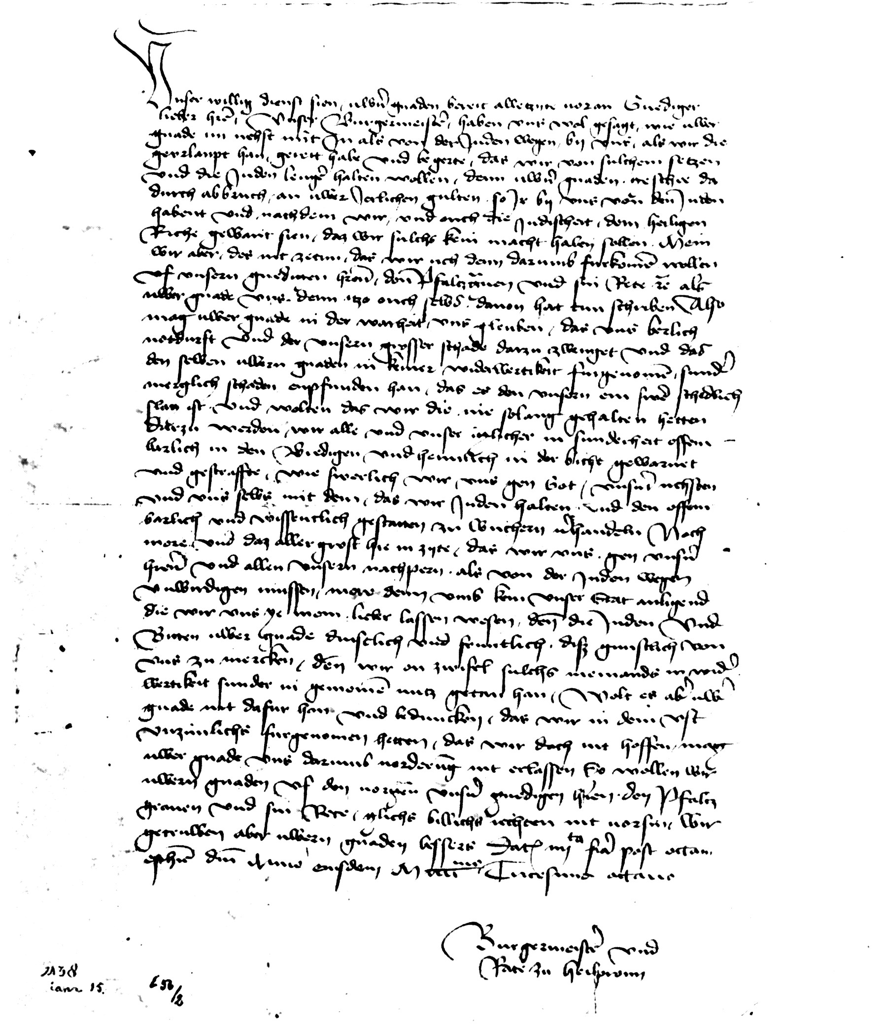 Aus * Angerbauer, Wolfram:Synagoge Affaltrach - Museum zur Geschichte der Juden in Kreis und Stadt Heilbronn. Katalog . Heilbronn,1989. ISBN 3-9801562-2-2 Brief des Bürgermeister und Rats von Heilbronn aus dem Jahre 1438, in dem die Gründe für das Stadtverbot dargelegt werden. Mehr als 100 Jahre alt.